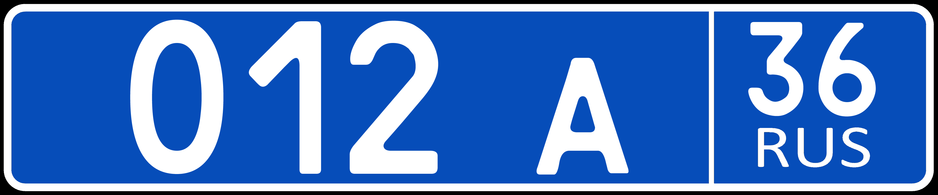 Номерной знак полицейских прицепов